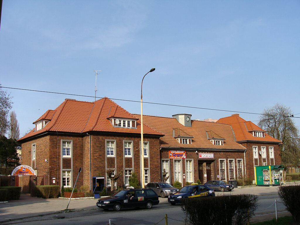 Budynek główny nieczynnej stacji kolejowej Szczecin Niebuszewo